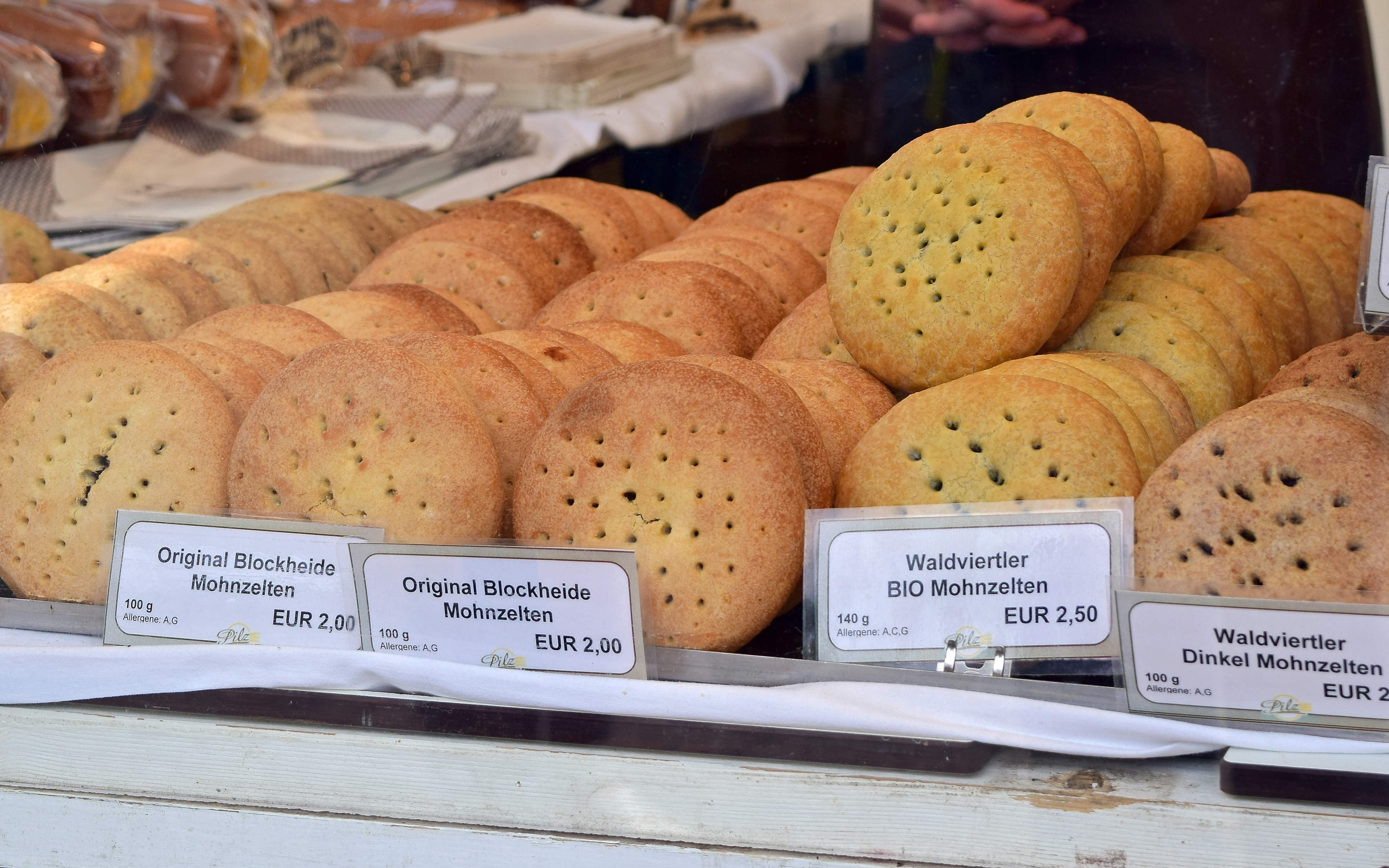 Mohnzelten der Bäckerei Pilz bei waldviertelpur 2018 am Wiener Rathausplatz